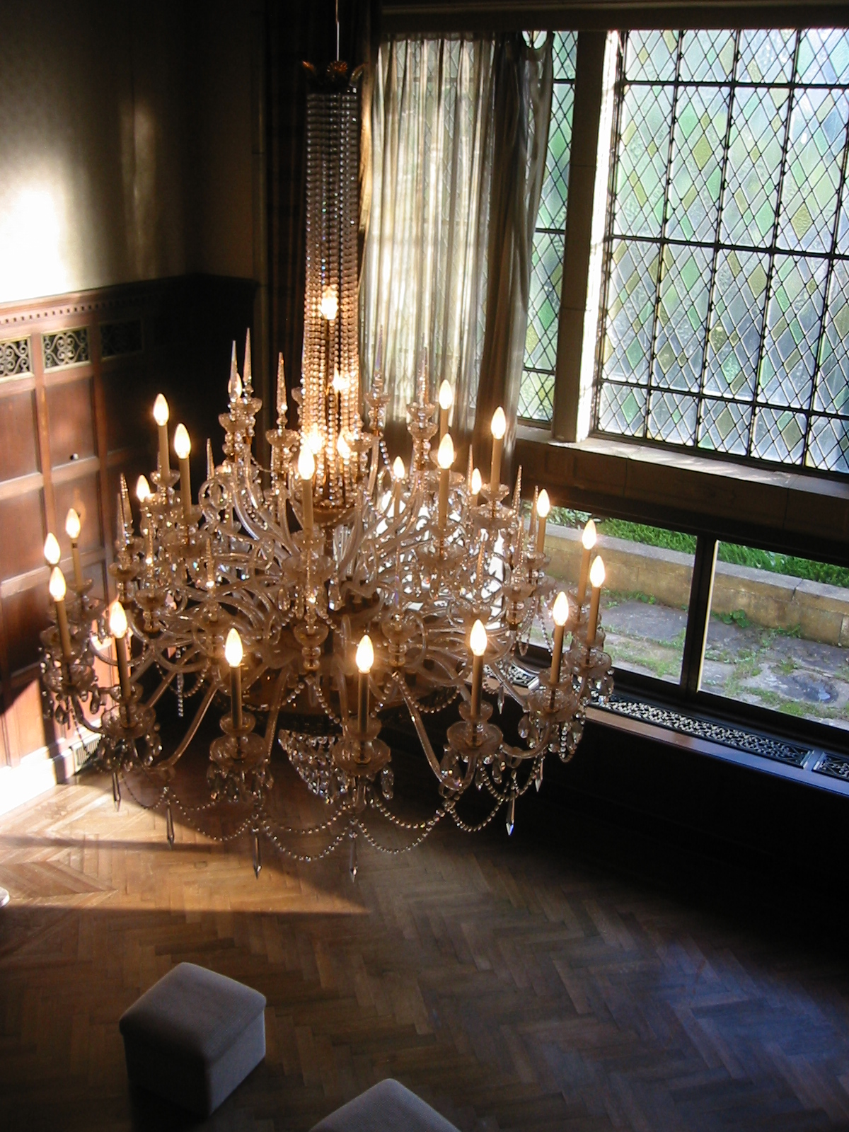 神戸、旧乾邸(渡辺節)シャンデリアとステンドグラス。(神戸市東灘区住吉山手５)